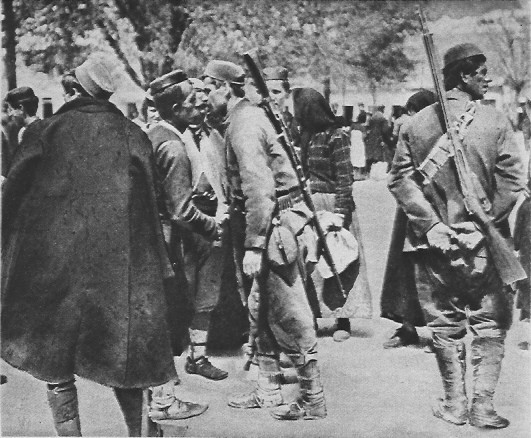 des_soldat_montenégrins_partant_au_front prise à Lovcen, destination_Cettinié.